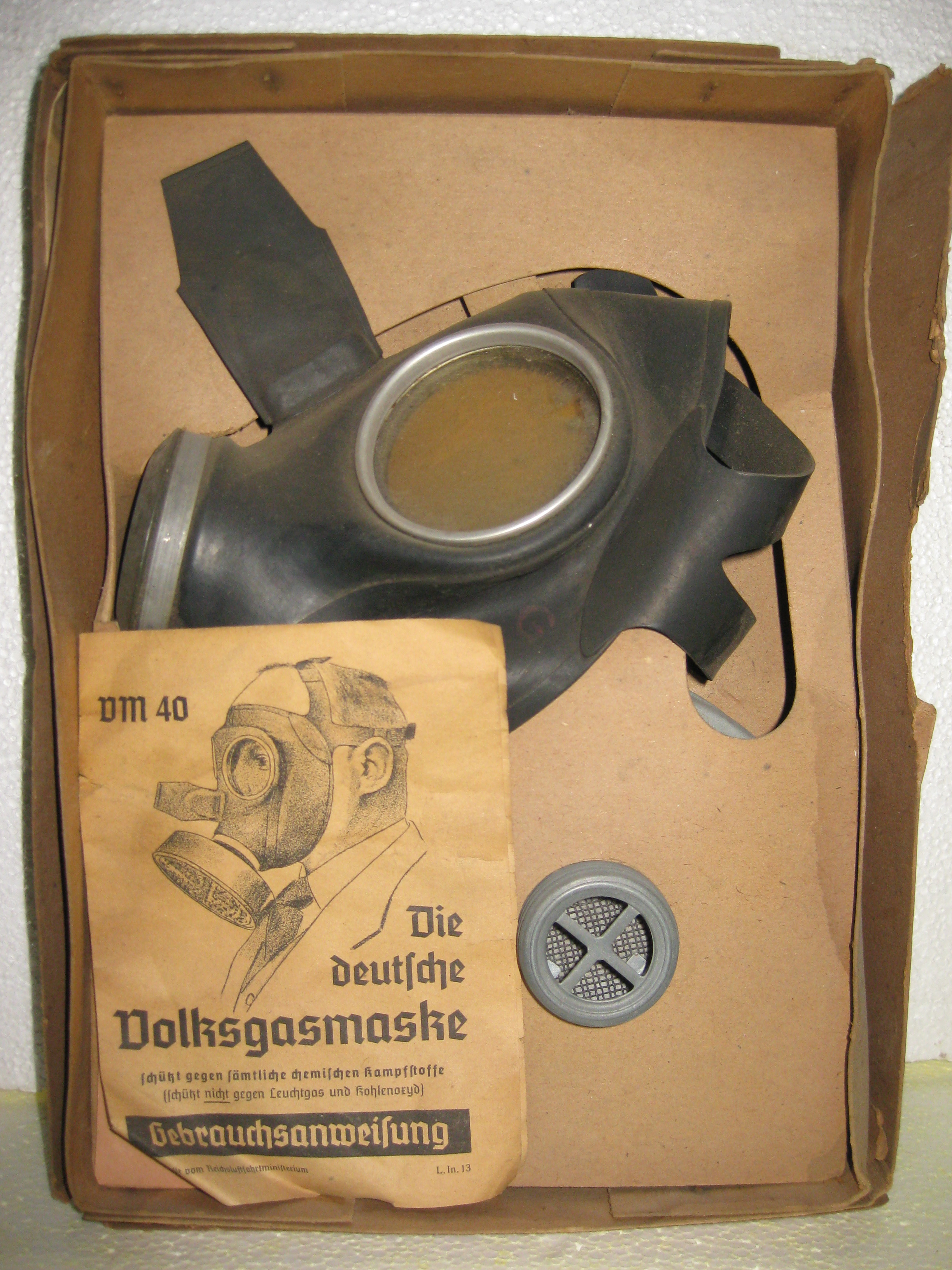 Volksgasmaske aus der zeit des 3. Reichs, Exponat im Rheinland-Pfälzischen Feuerwehrmuseum Hermeskeil